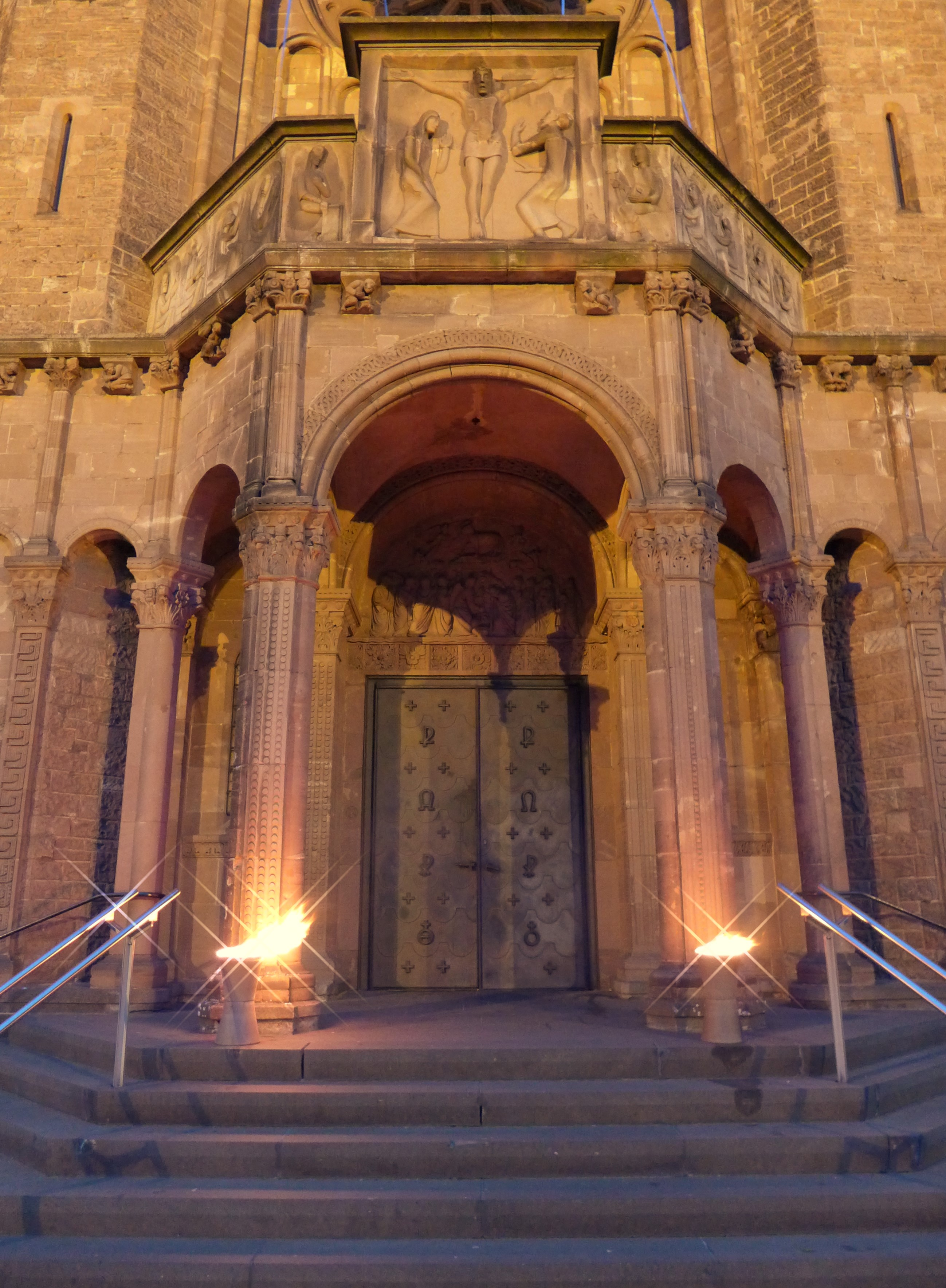 Saardom, Portal mit Pfingstfeuern